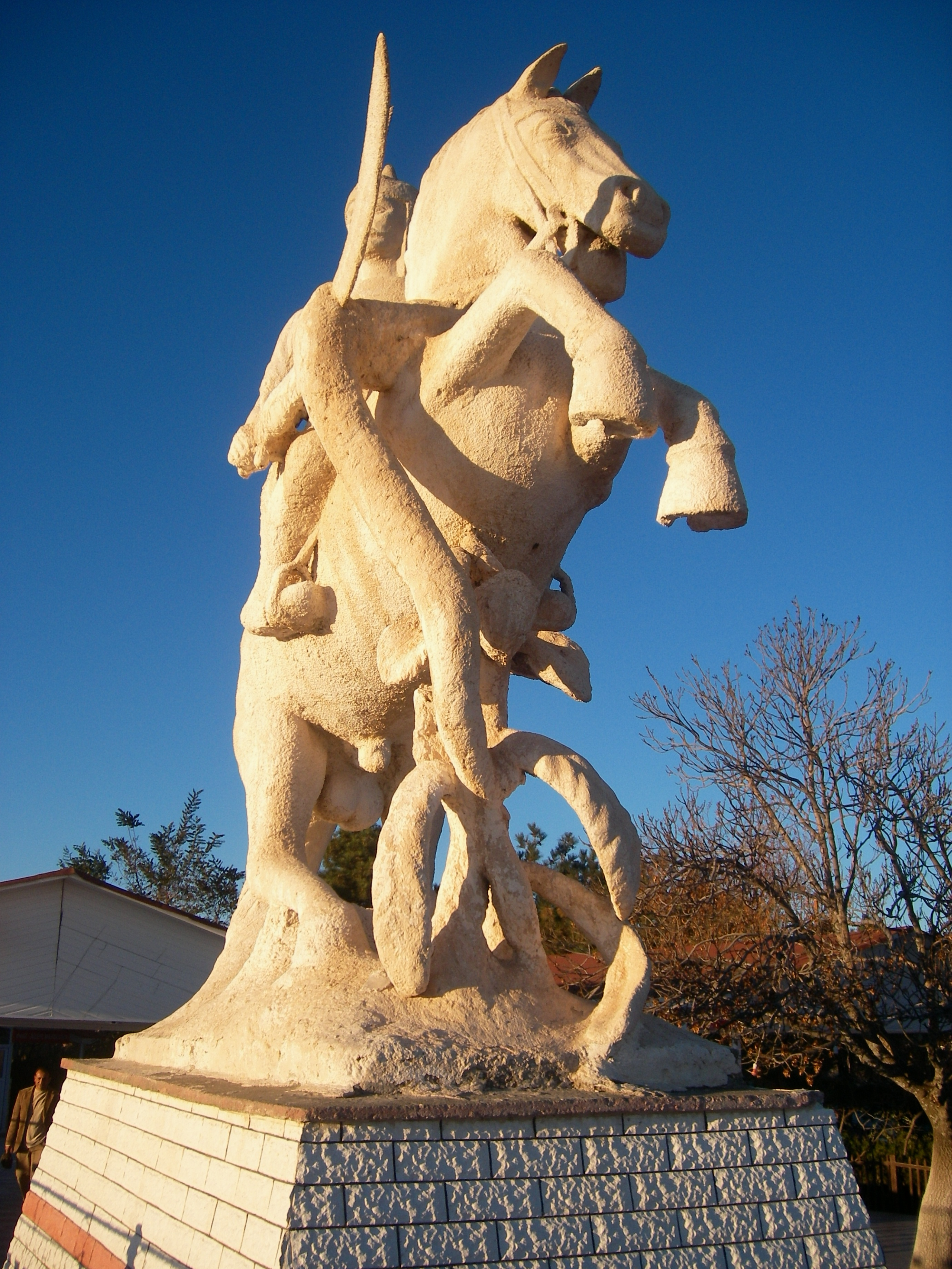 Elazığ'da Balak Gazi Heykeli